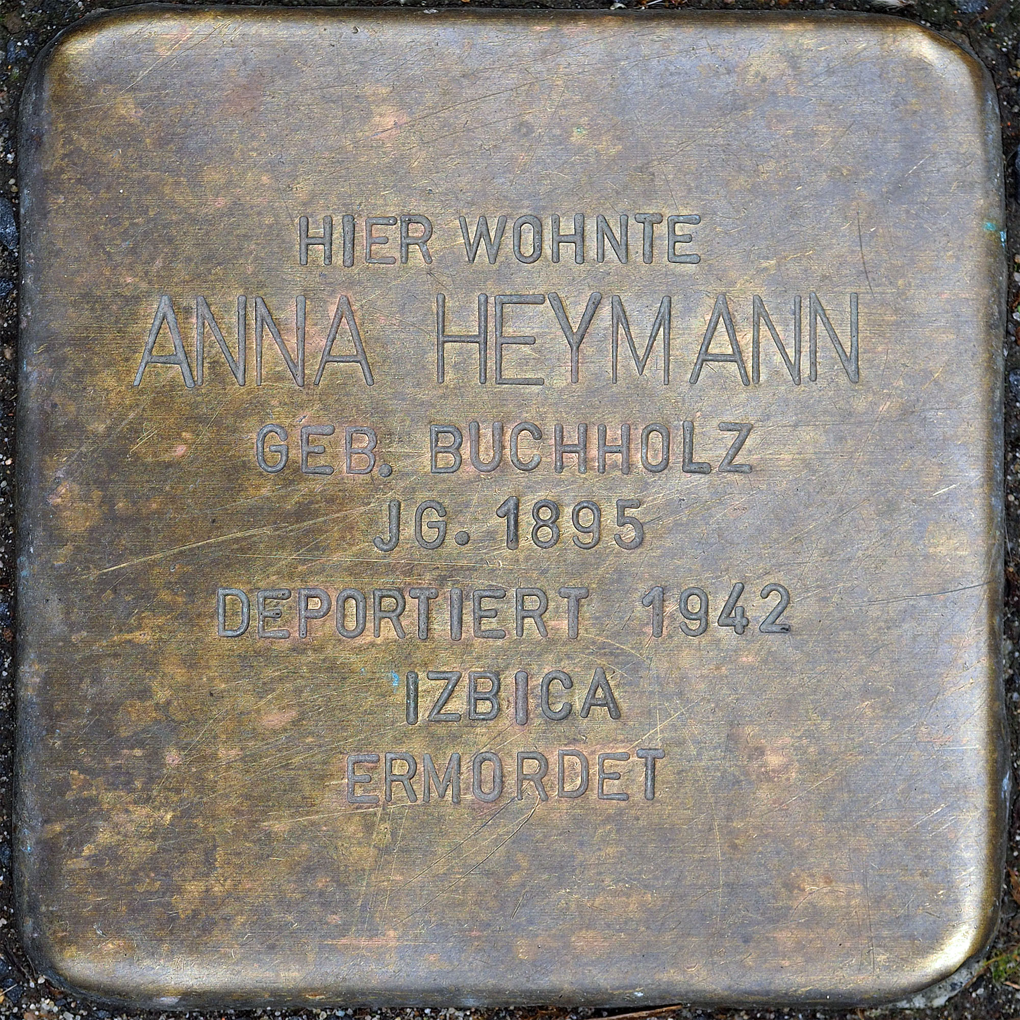 Stolpersteine MG: Heymann, Anna